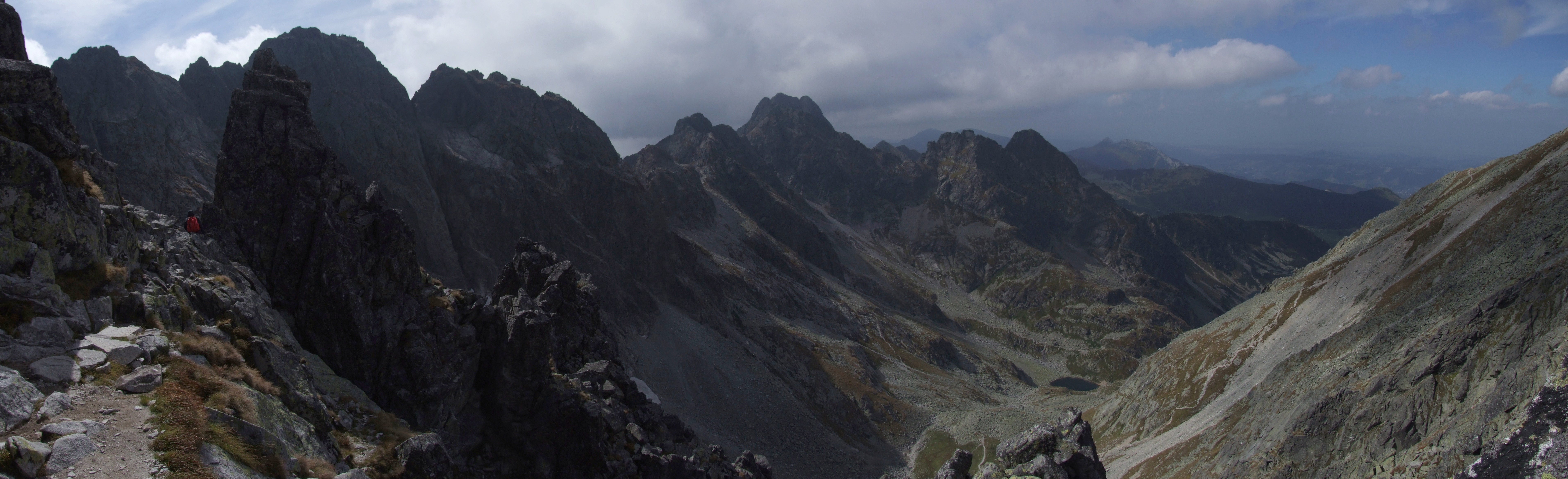 Panorama z Granatów. W dole Kozia Dolinka. Szczyty od lewej to kolejno:Kościelec, Zadni Kościelec i Zawratowa Turnia, ponad nią Świnica, dalej Mały Kozi Wierch, Zmarzłe Czuby, Kozie Czuby, Kozi Wierch